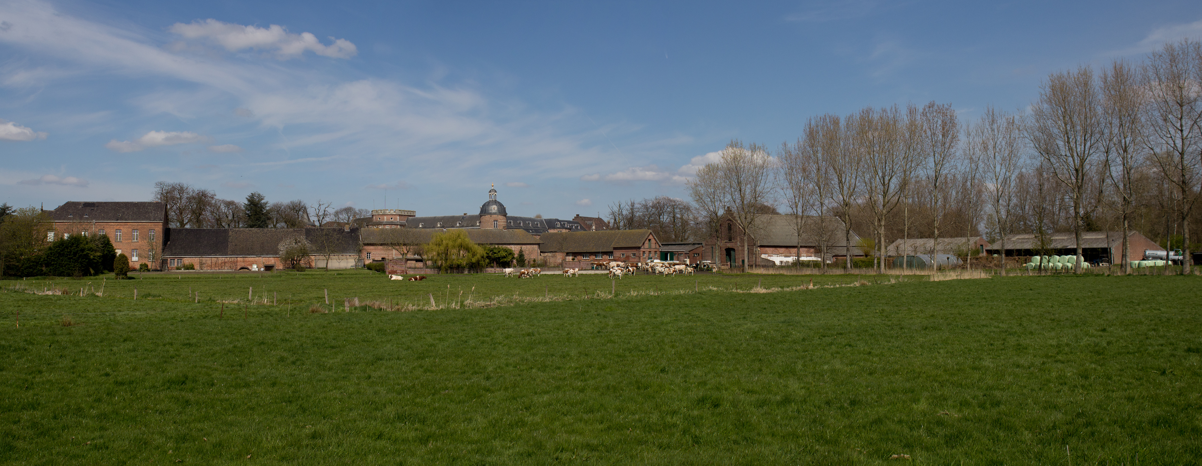 Hoogstraten. Gelmelslot